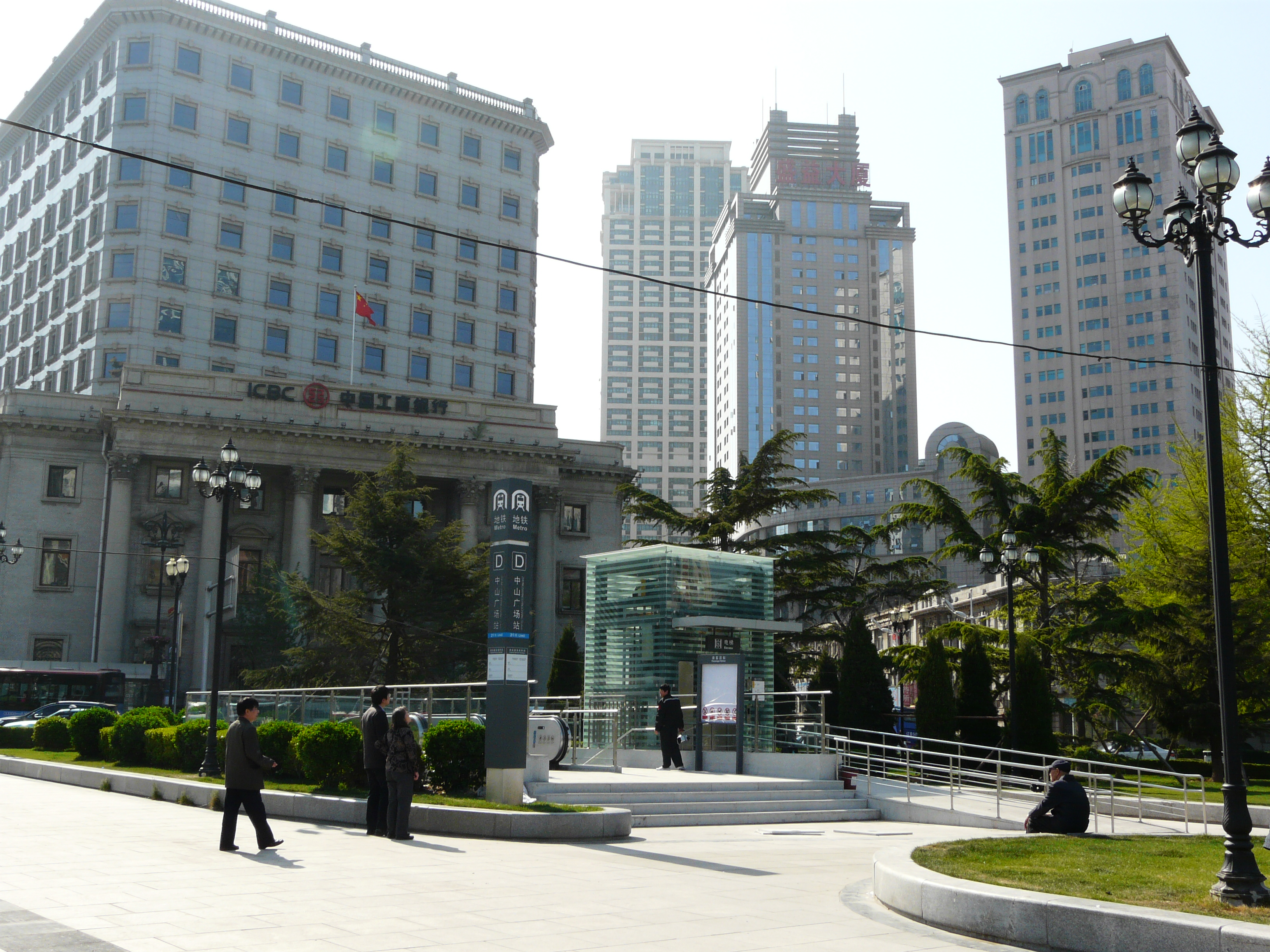 大连地铁2号线的一个车站